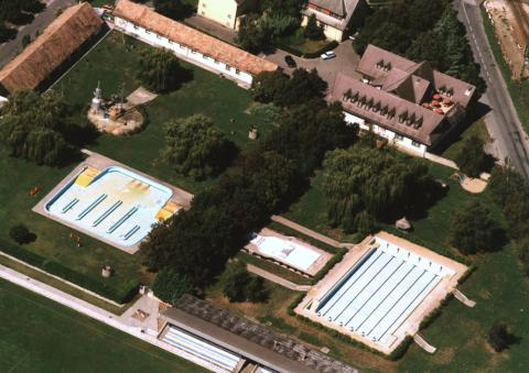 Petőháza, Hungary, aerialphotography